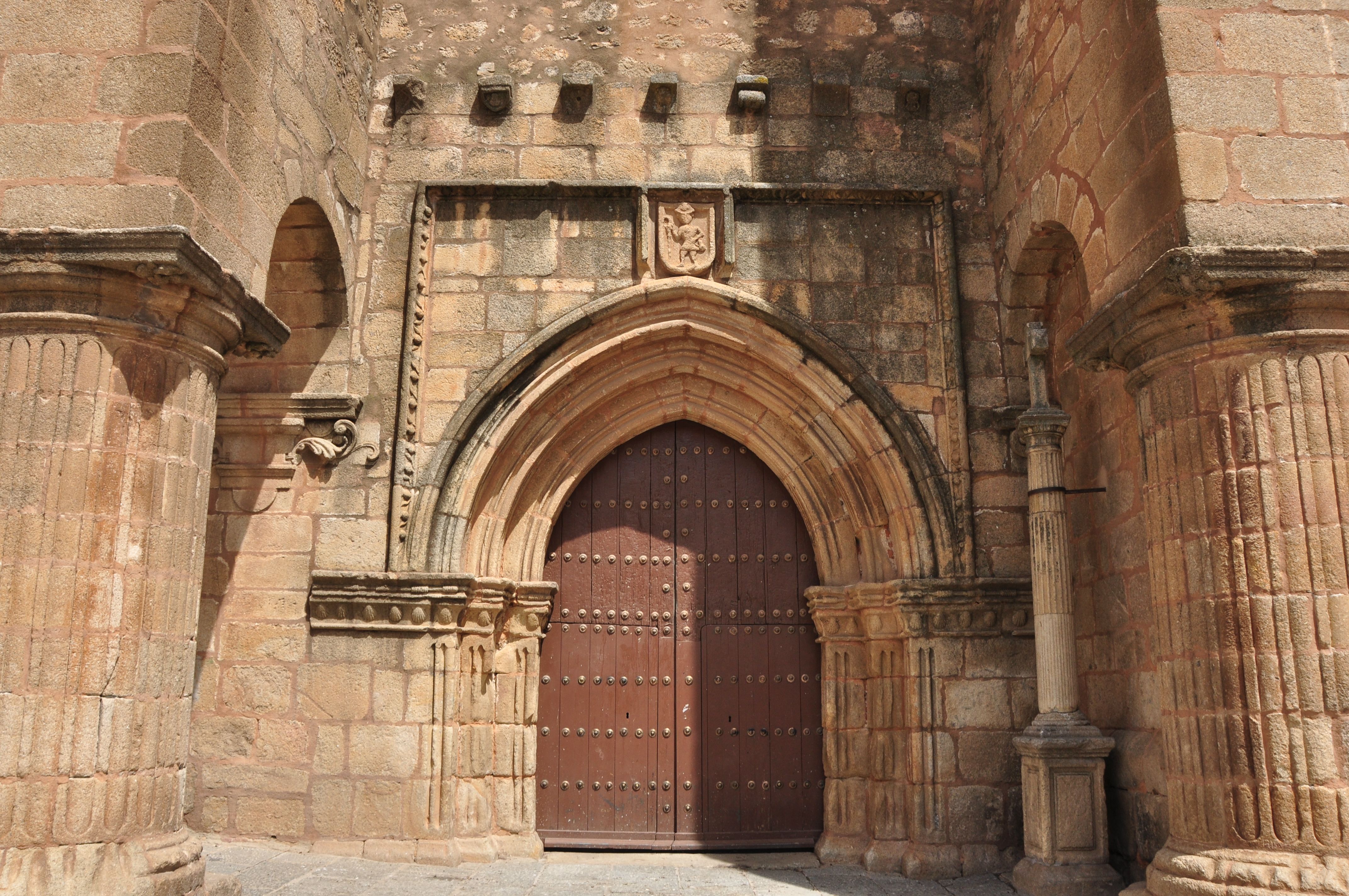 Puerta de la Epistola en la Iglesia de Santiago de Cáceres. Sobre el arco aparece un escudo representando a Santiago como peregrino.